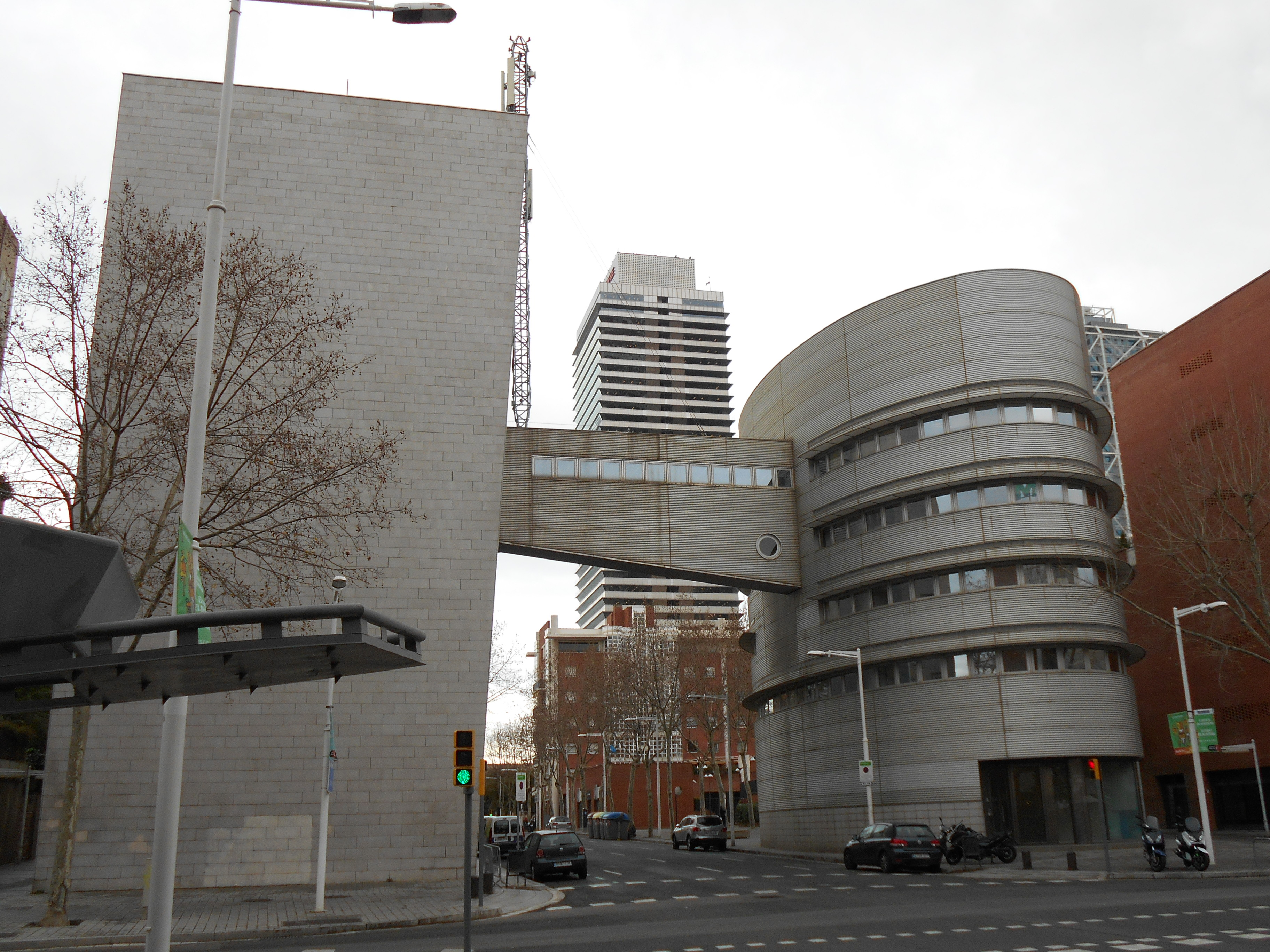 Central Telefónica (1989-1992), de Jaume Bach y Gabriel Mora.